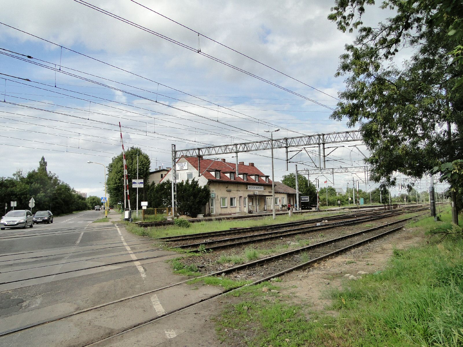 Stacja kolejowa Szczecin Gumieńce